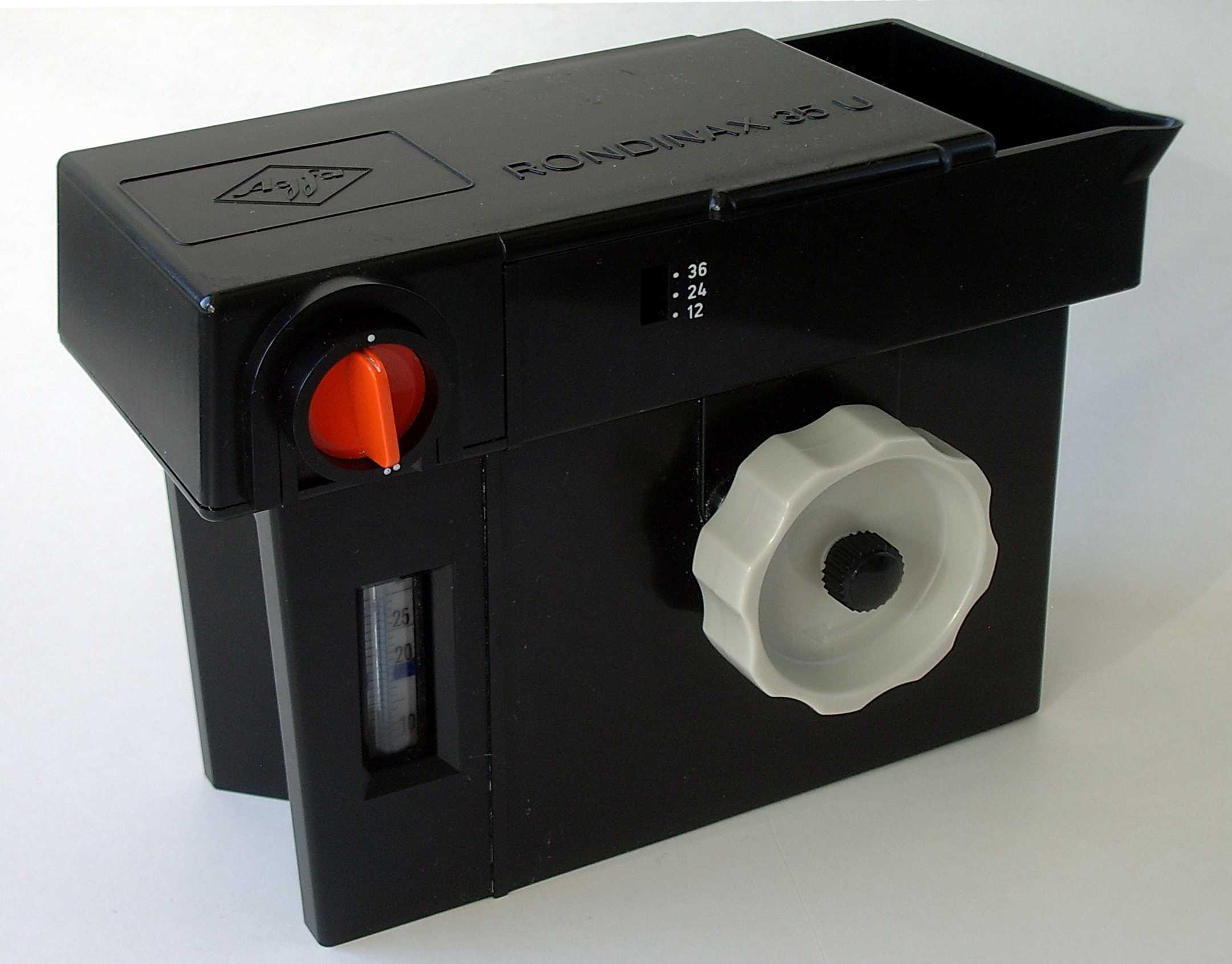 Agfa Rondinax 35 U - Daylight Developing Tank - Tageslichtentwicklungsdose